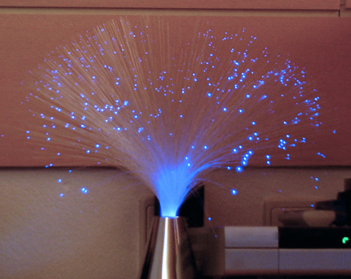 eine Glasfaserlampe; Dekorationslampe mit polymeren Lichtwellenleitern